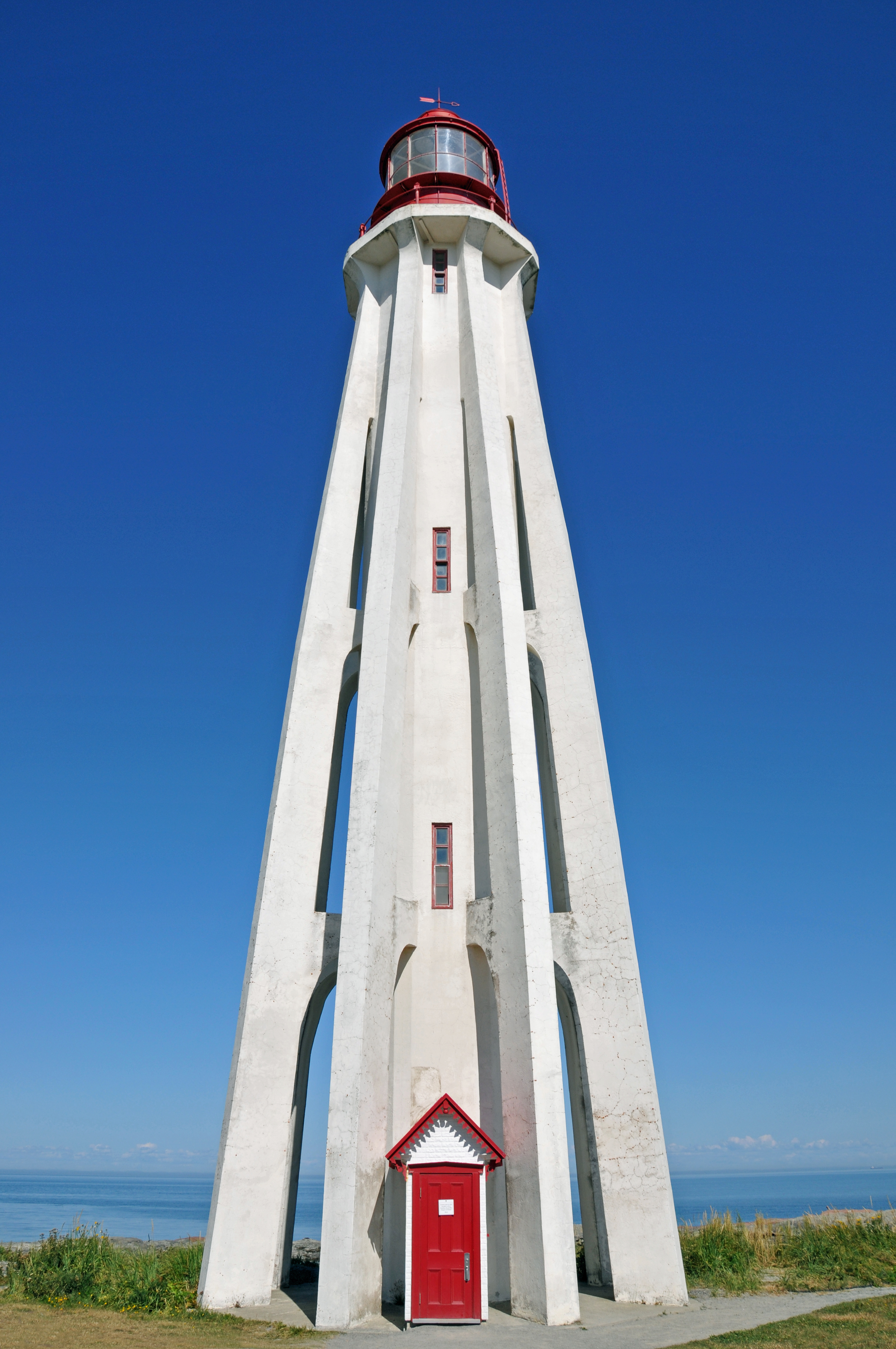 Vue de l'entrée et du phare de Pointe-au-Père